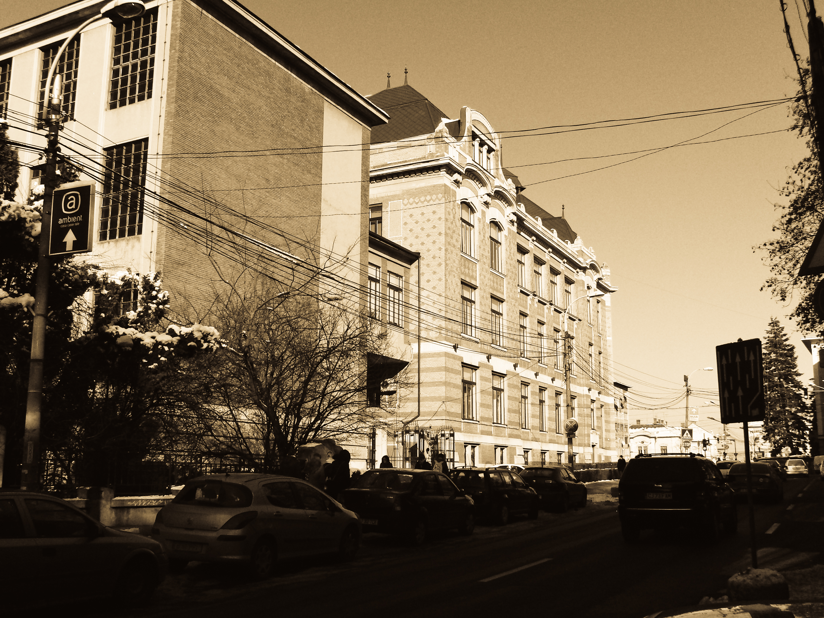 Biblioteca Centrală Universitară "Lucian Blaga" Cluj-Napoca